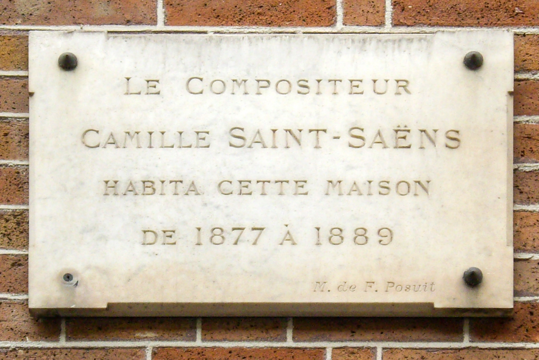 Plaque apposée au n° 14 de la rue Monsieur-le-Prince, Paris 6e, où habita le compositeur Camille Saint-Saëns (1835-1921) de 1877 à 1889.